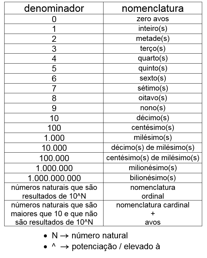 Nomenclaturas de denominadores fracionários.